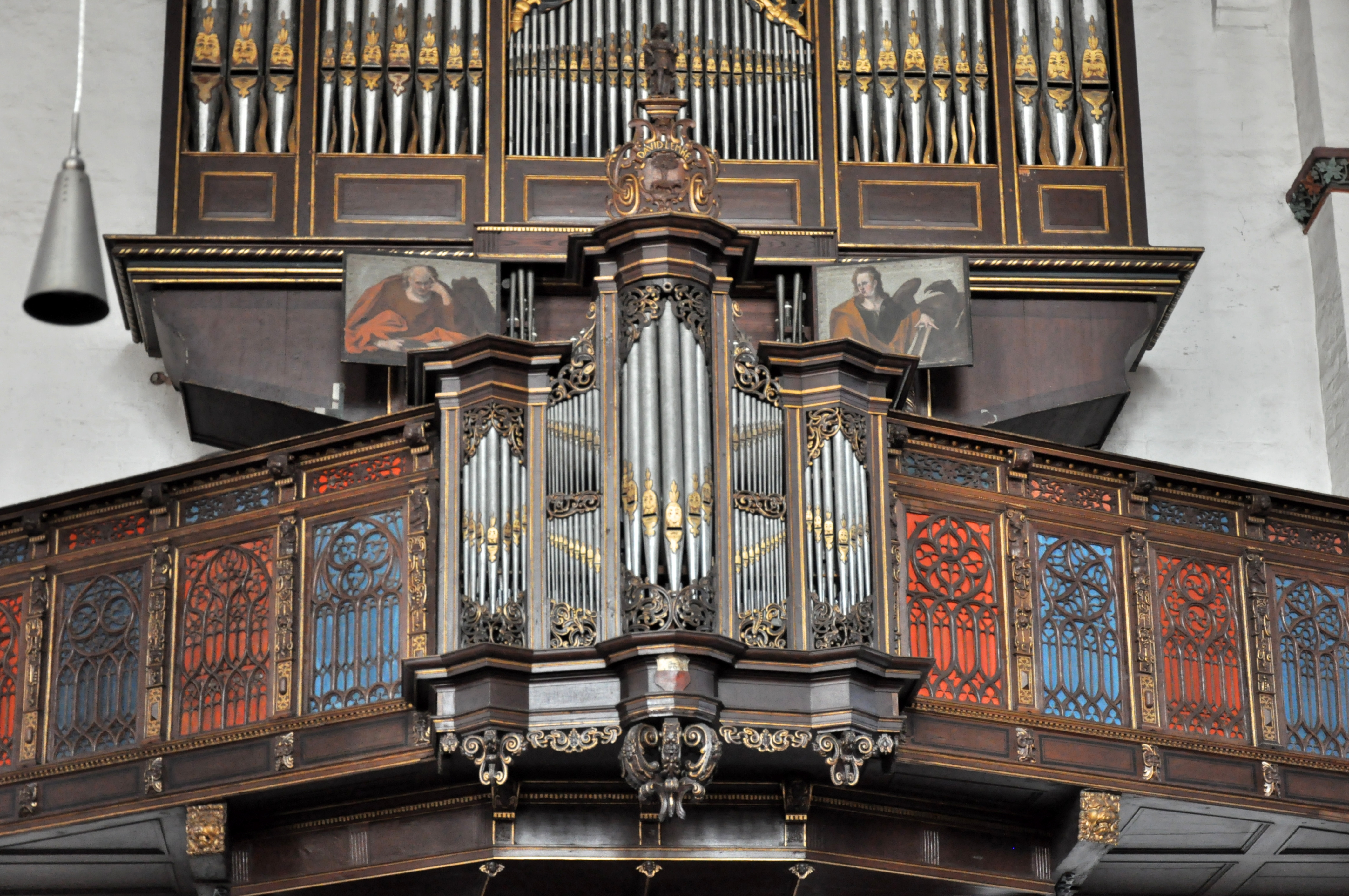 Orgel Lübeck, Jakobi, Stellwagen-Orgel